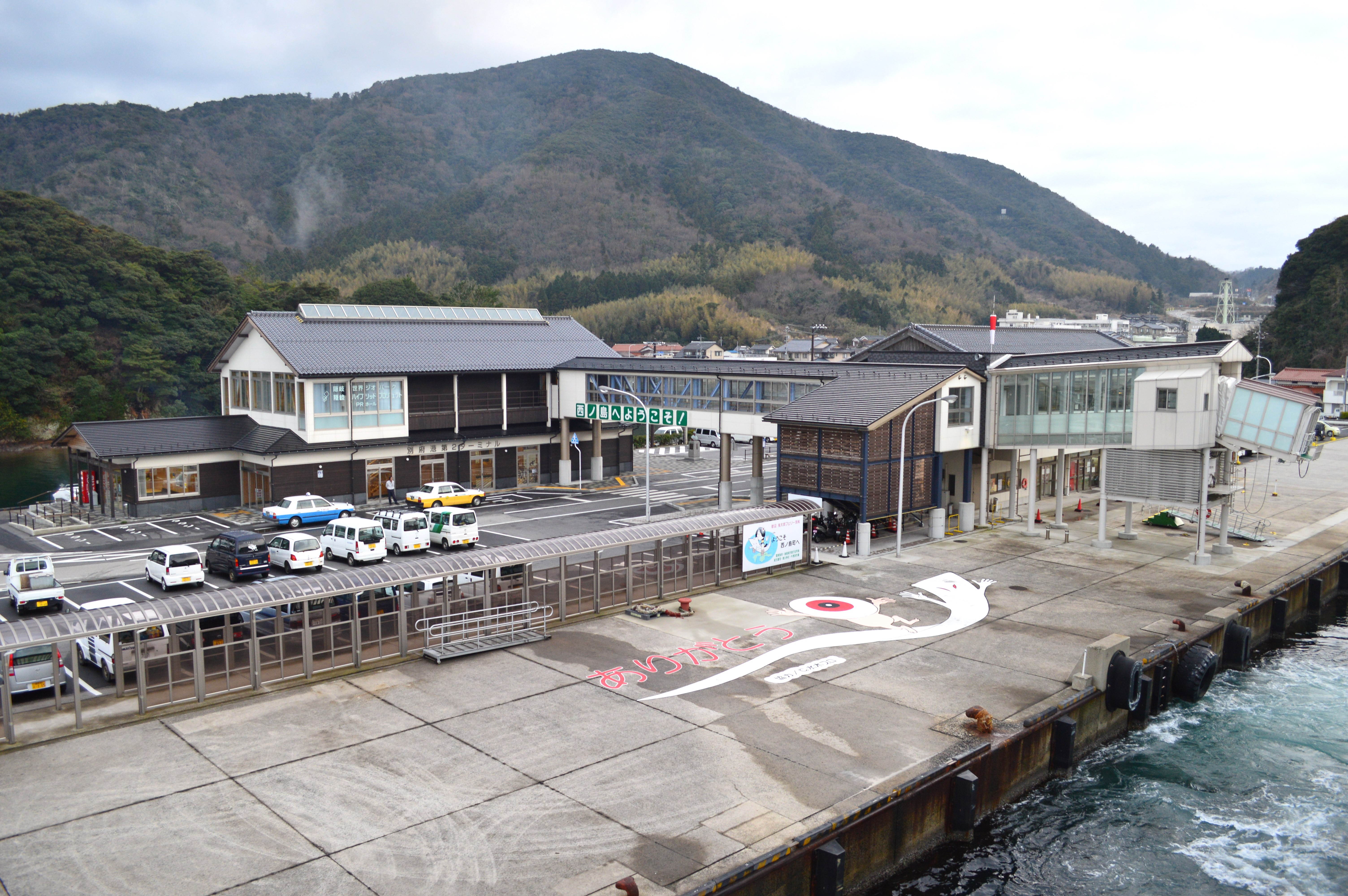 別府港 (島根県) ターミナルビル